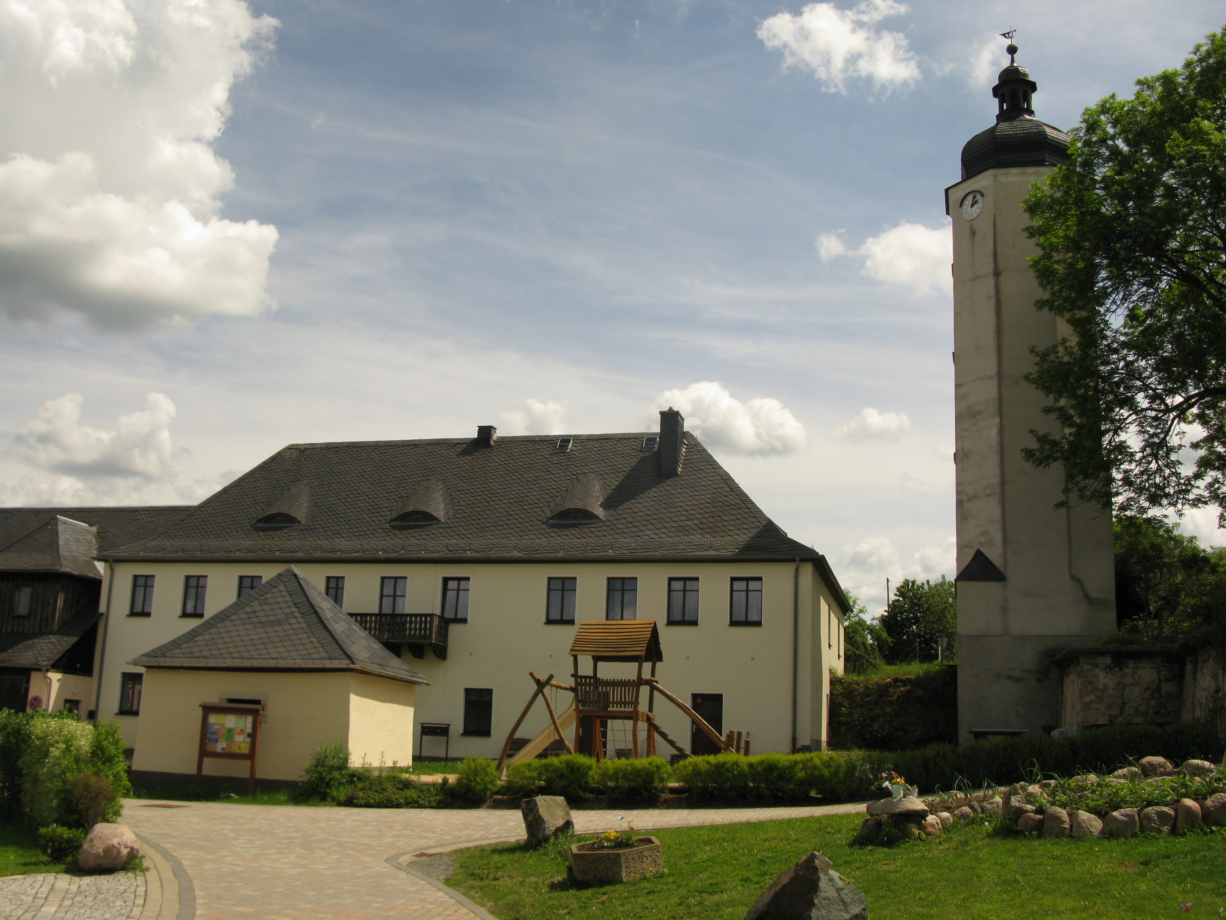 Rosenbach/Vogtl., Ortsteil Rößnitz: denkmalgeschütztes Herrenhaus Rößnitz in der Teichstraße 2 (Sächsische Denkmal-ID:09231945)